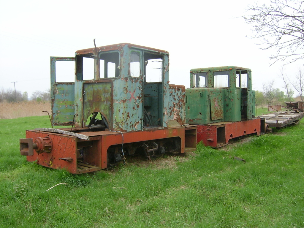 Egy külső és egy belső csapágyazású roncs C–50-es mozdony a Tömörkényi Halgazdasági Vasúton